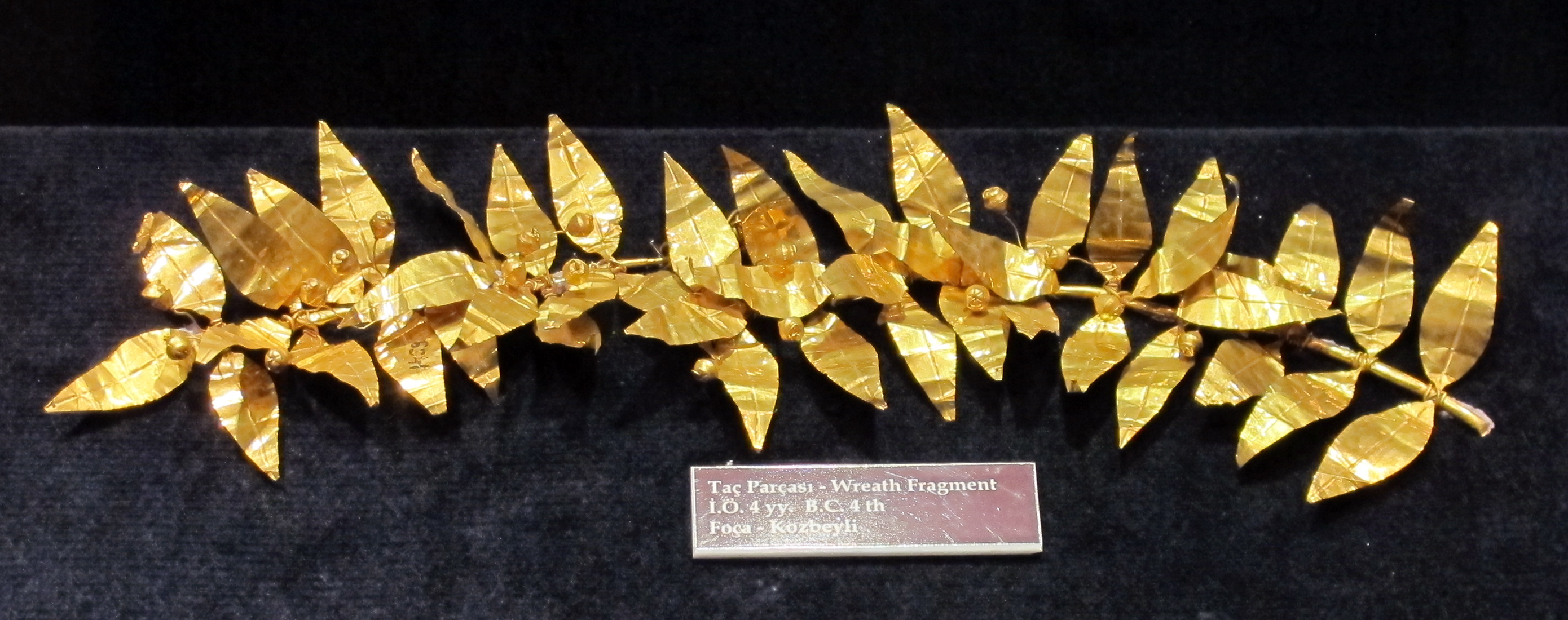 Frammento di corona d'alloro, oro, IV sec ac., da foça